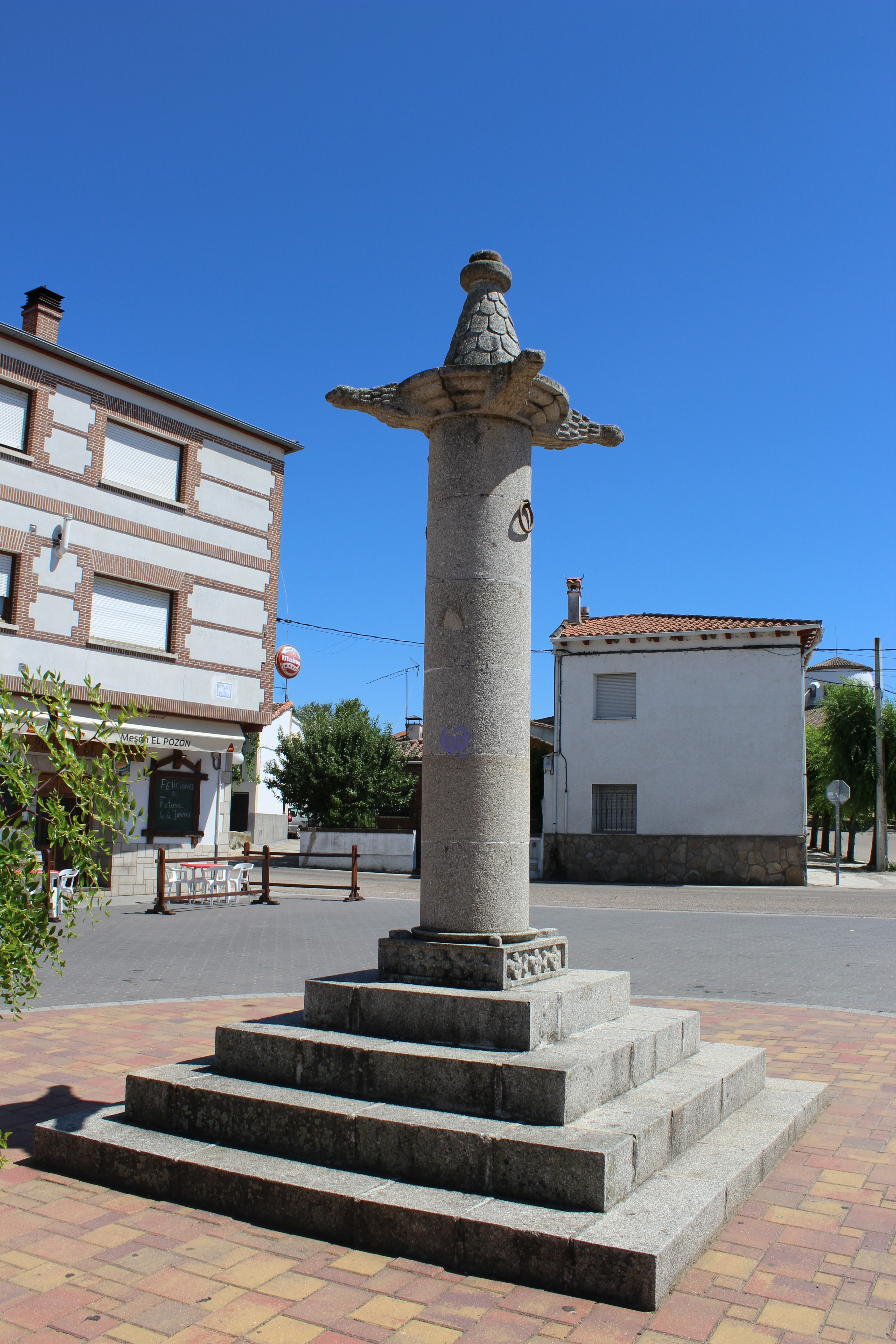 Rollo-picota de Parrillas, Toledo.